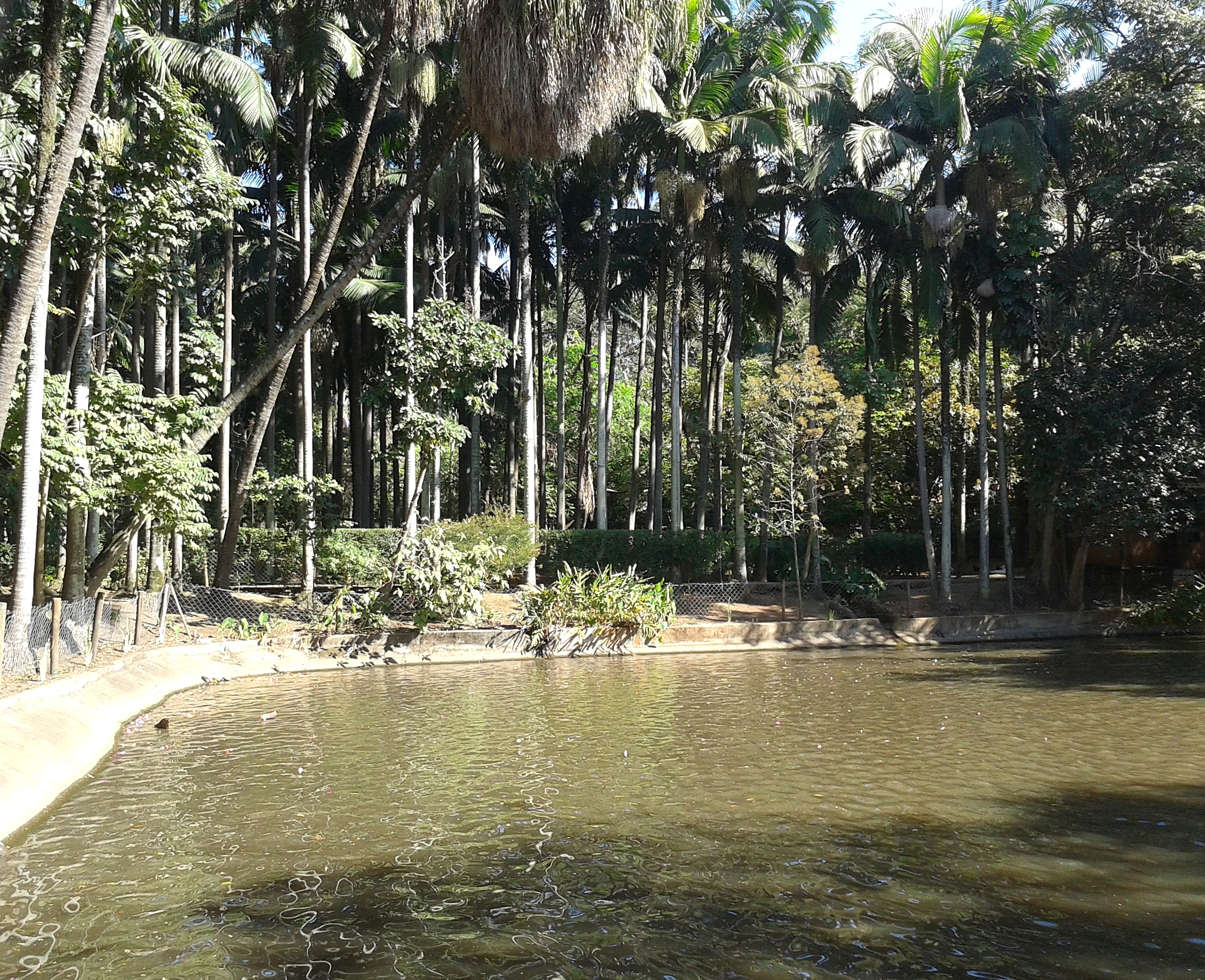 Lago no Parque da Água Branca, em São Paulo, SP, Brasil.